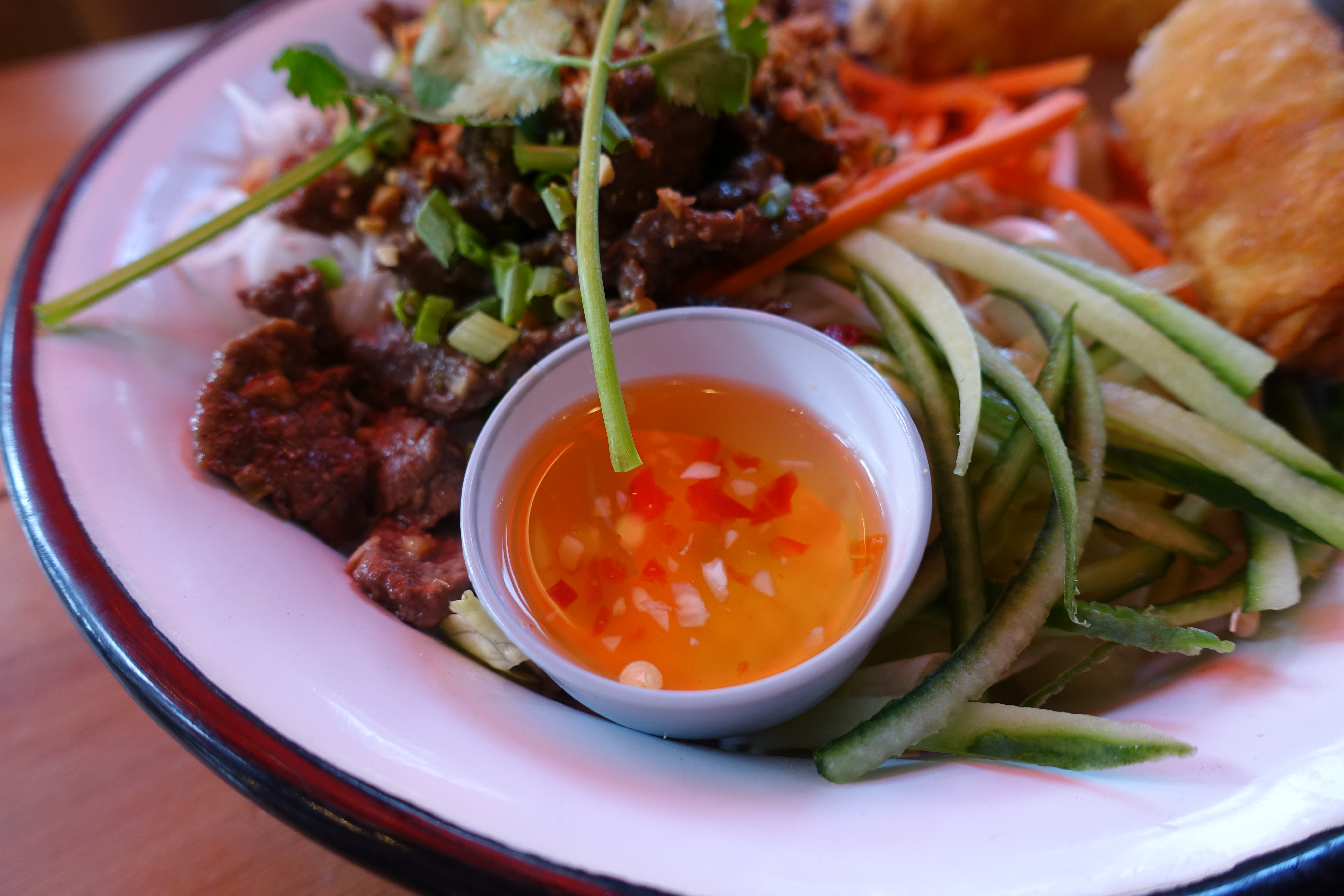 Nuoc Cham sauce @ Bo Bun @ James Bun @ Place de Clichy @ Paris